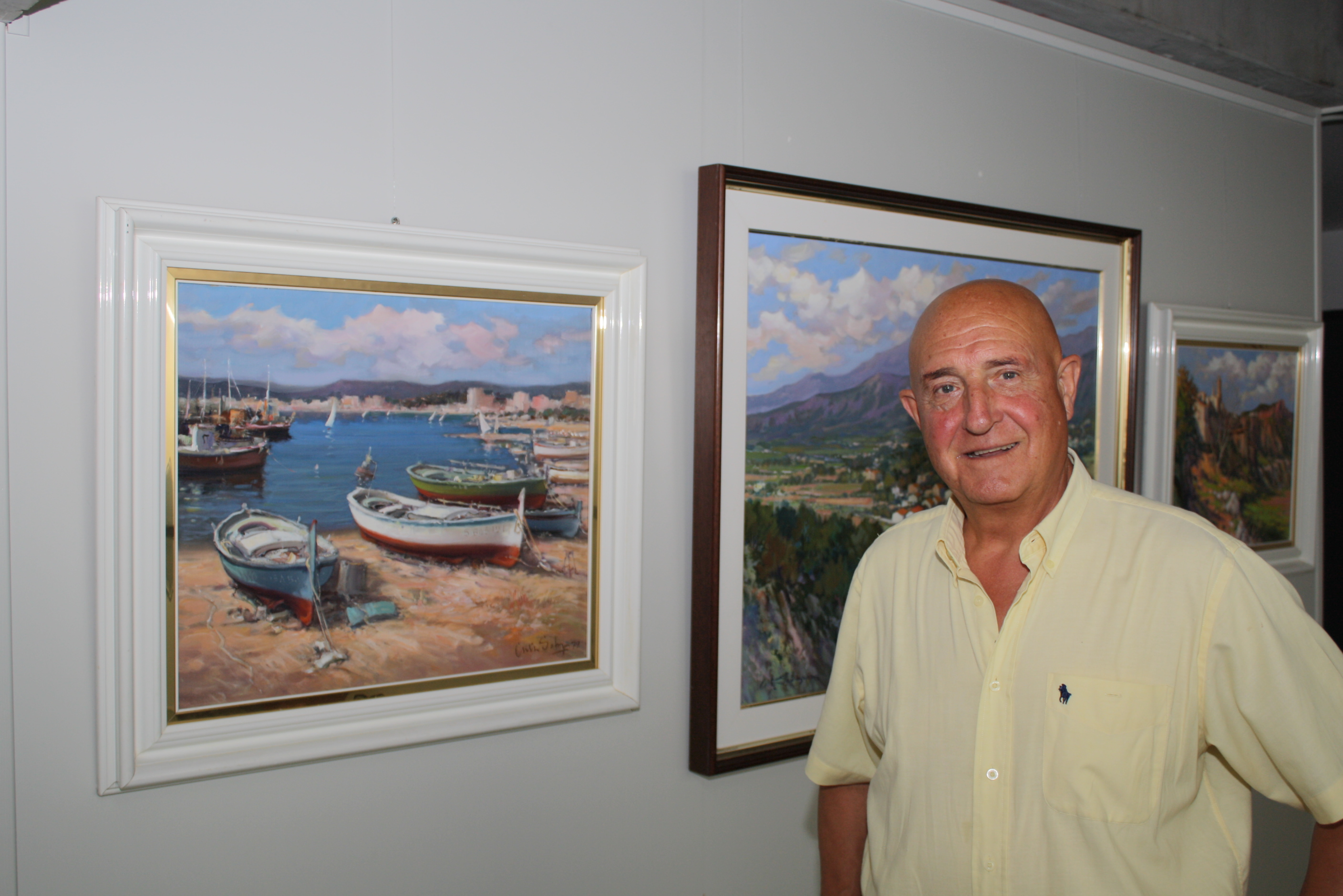 Costa Sobrepera, pintor palafrugellenc